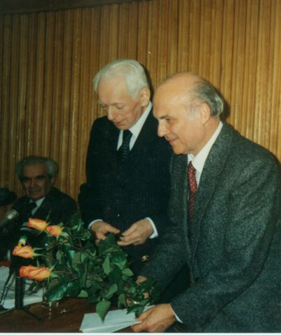 Polish writers: prof. Zdzisław Libera (1913-1998), Artur Międzyrzecki (1922-1996) i Ryszard Kapuściński (1932-2007).